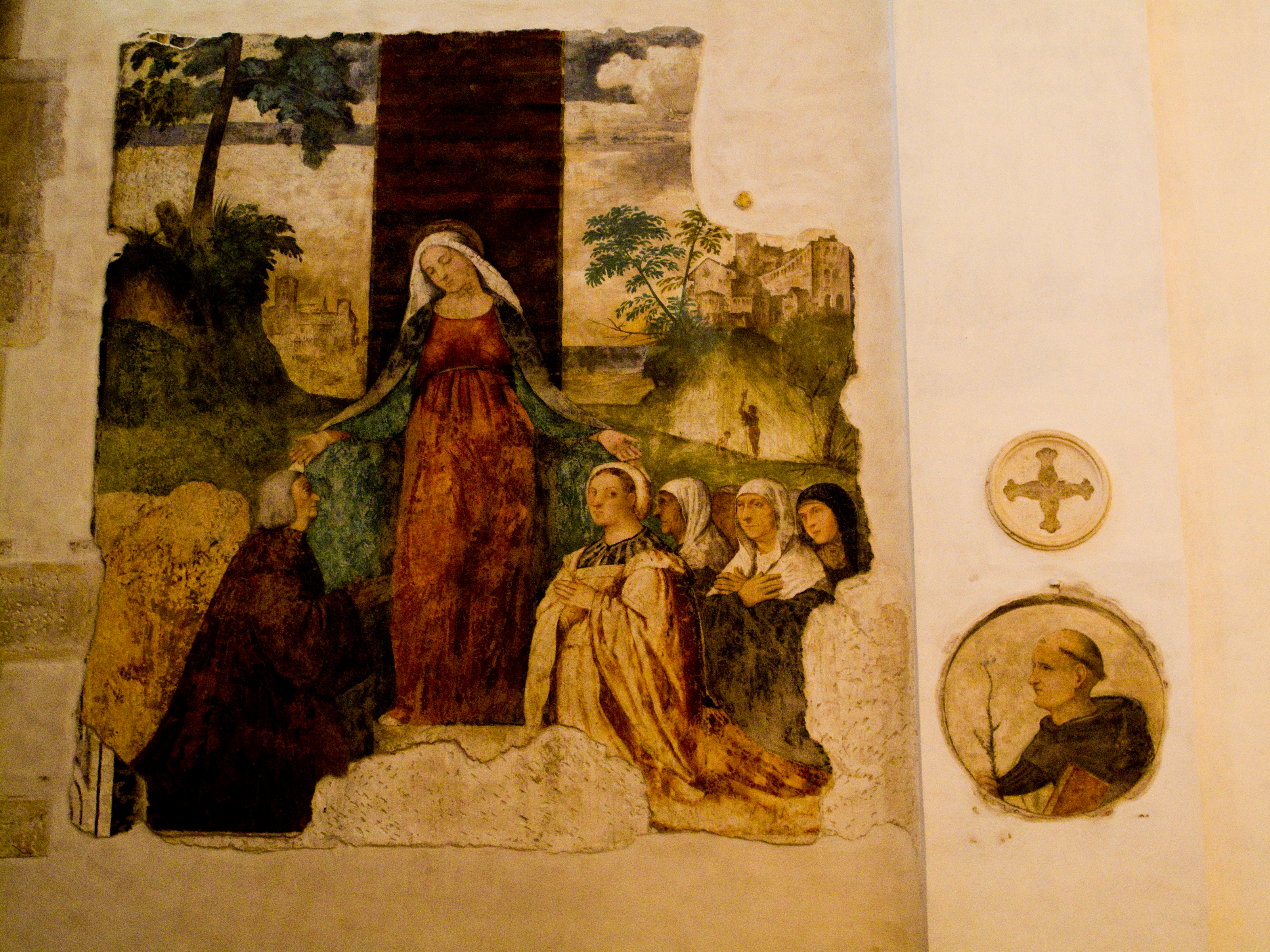 Vicenza - Chiesa di Santa Corona - Madonna della misericordia che protegge i fedeli della Confraternita dei Turchini